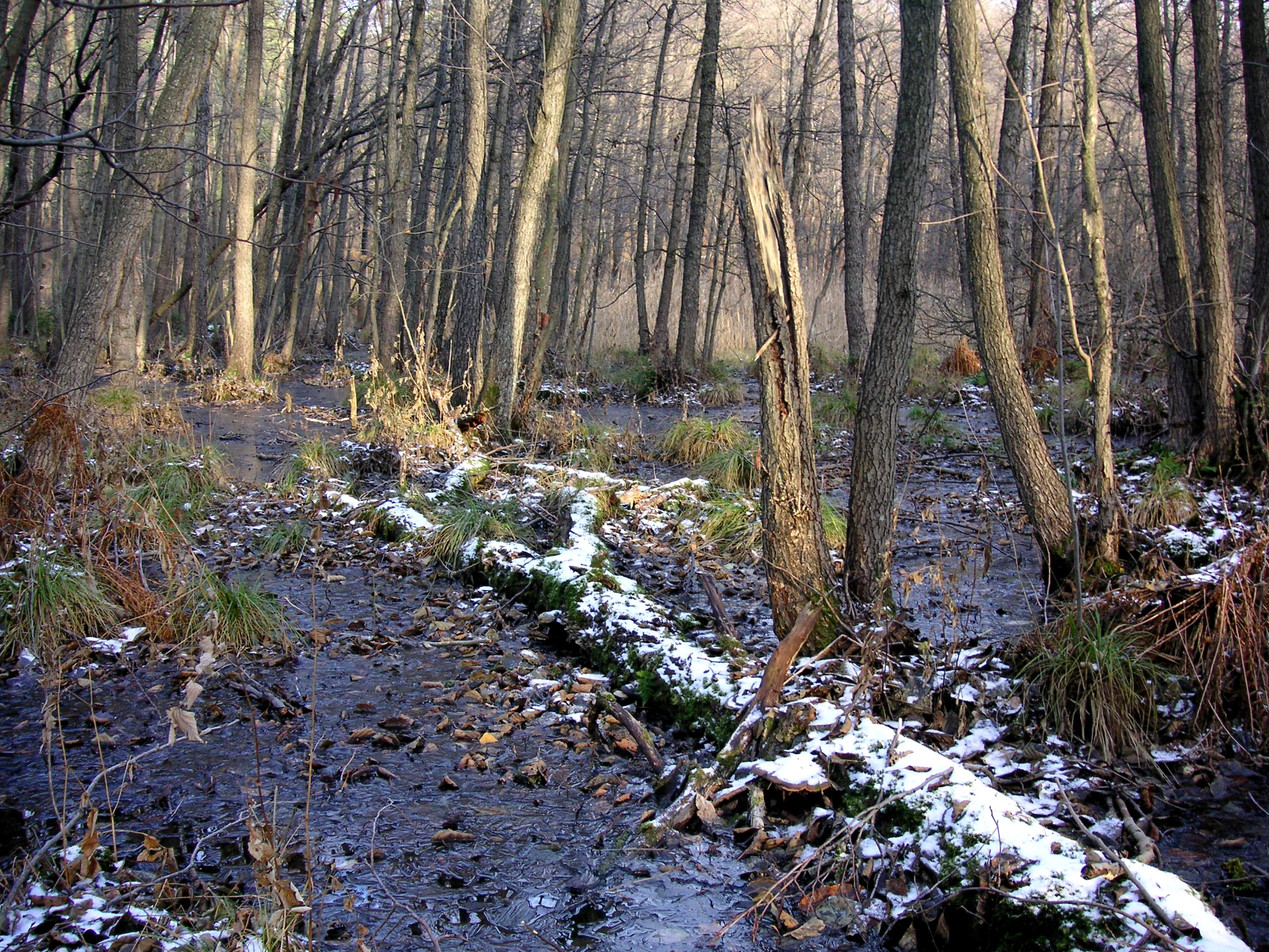 Djurgården i Stockholm, Uggleviken, alkärr